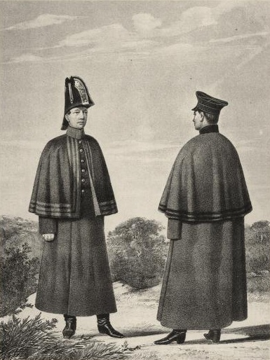 Гвардейский и Армейский Денщики, 1819-1825. Это изображение было также использовано для иллюстрирования статьи «Денщики» опубликованной в девятом томе «Военной энциклопедии», который был издан книгоиздательским товариществом И. Д. Сытина в 1912 году в столице Российской империи городе Санкт-Петербурге.